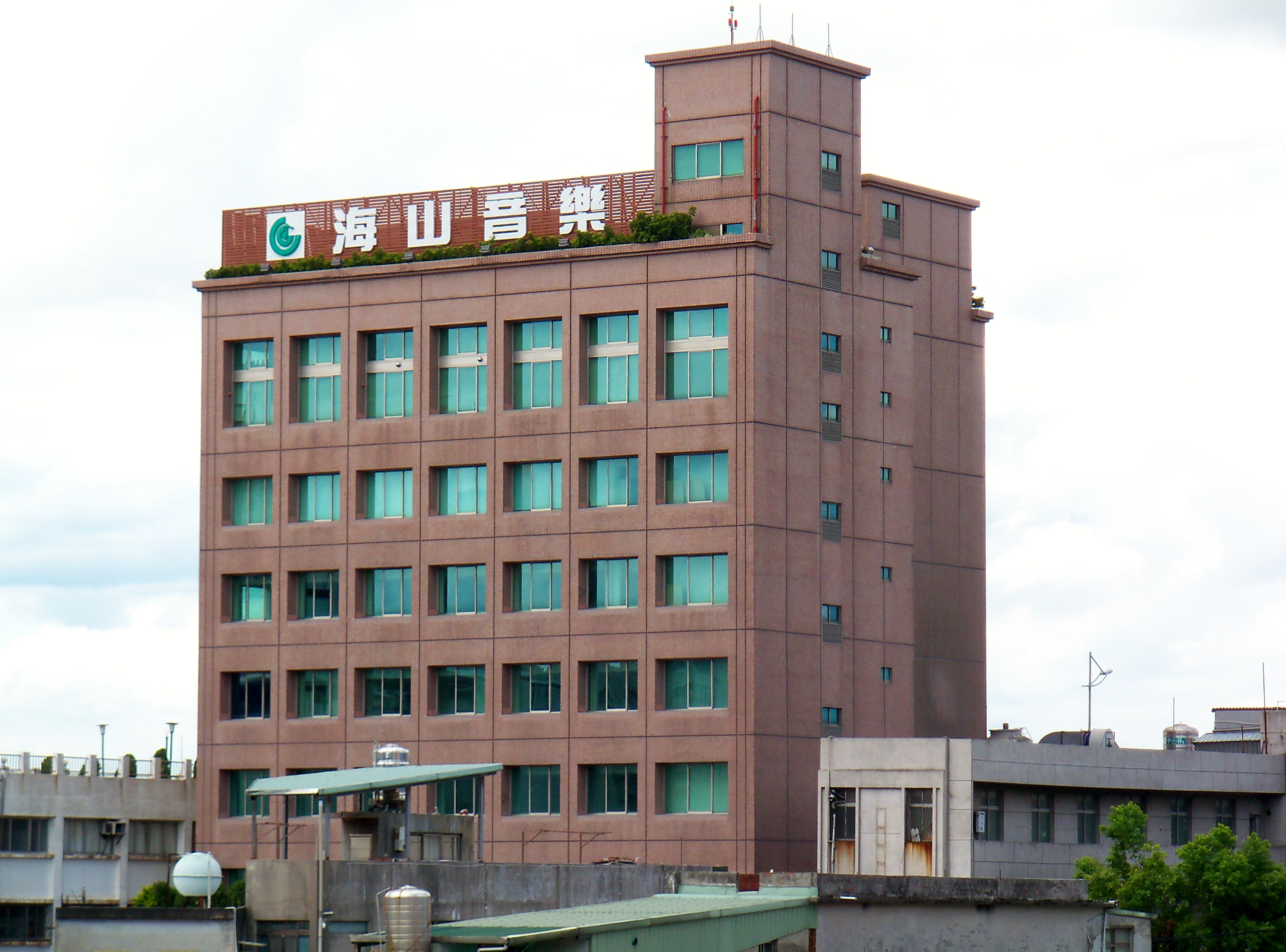 中文（台灣）: 海山音樂總部，地址：臺北市北投區大業路10號7樓（聯城國際大樓）。攝於臺北捷運淡水線奇岩站西南，北投路一段正大橋上。